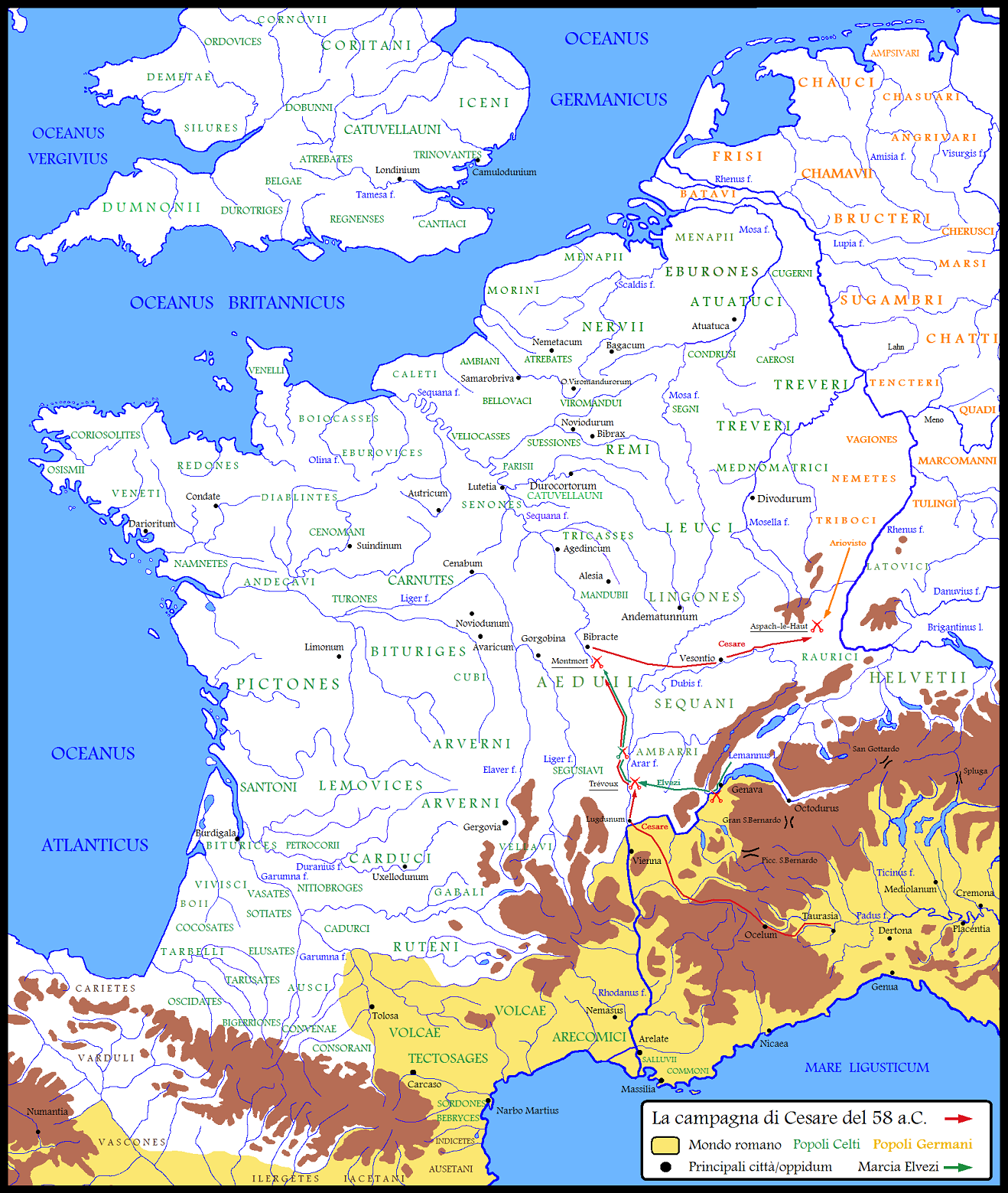 La Gallia nel corso del primo anno di campagne militari di Cesare